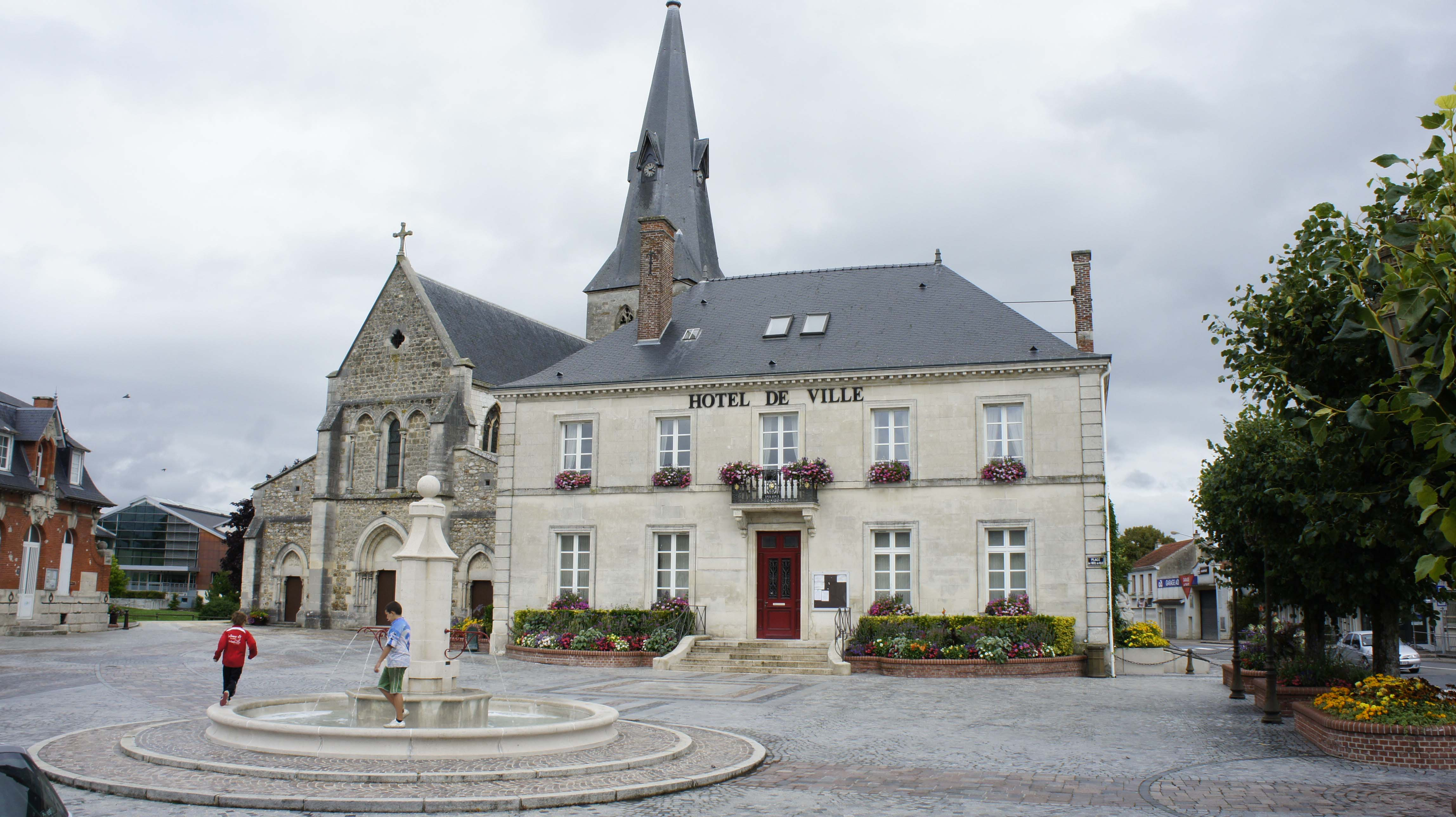 De gauche à droite : vue d'une partie du corps de garde, de la maison des associations (en retrait), de l'Église et de la mairie de Suippes.